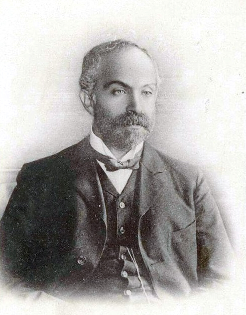 Влади́мир Ге́рманович Богора́з (псевдонимы Н. А. Тан, В. Г. Тан; известен также как Тан-Богора́з, Богораз-Тан, при публикациях в США: англ. Waldemar Bogoras; рожд. Ната́н Ме́нделевич Богора́з; 15 [27] апреля 1865, Овруч, Волынская губерния — 10 мая 1936, Ростовская область) — российский революционер, писатель, этнограф (этногеограф, этнокультуролог) и лингвист (исследователь чукотско-камчатских языков, языка азиатских эскимосов, эвенского языка), северовед.